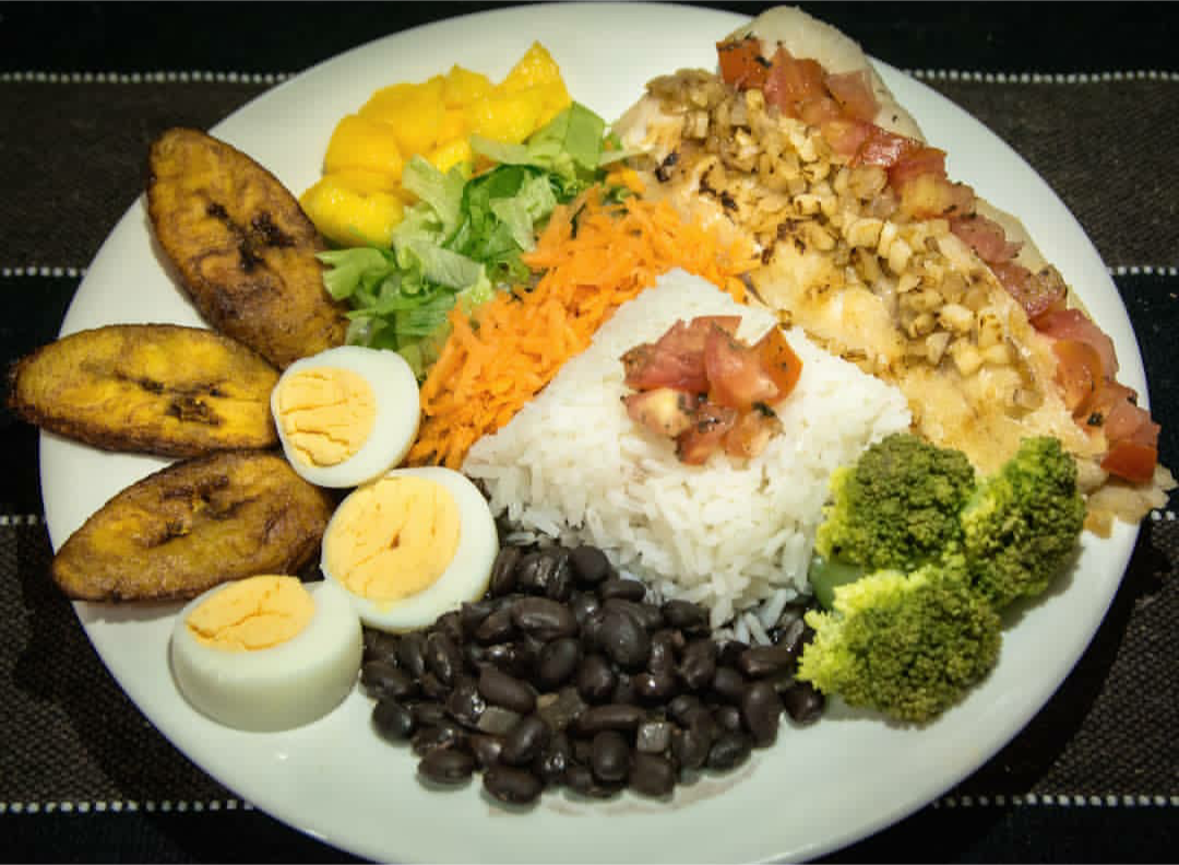 Casado con costillas y huevos duros servido en restaurante típico de San José, Costa Rica